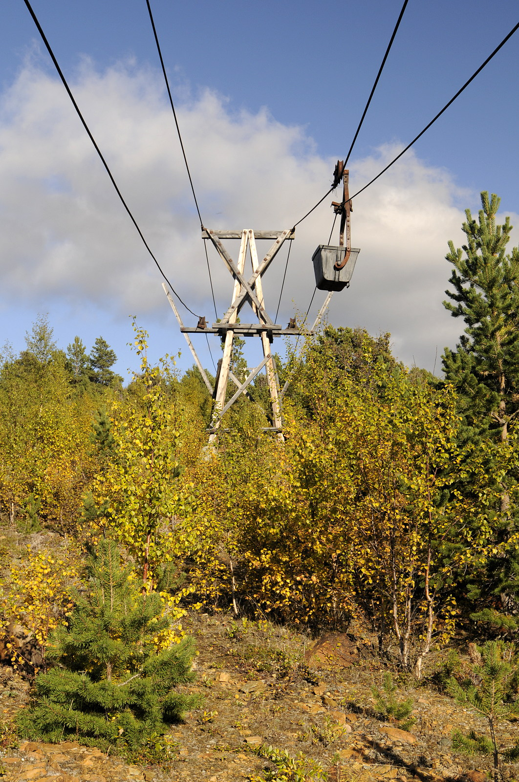 Rester etter taubanen ved Folldal gruver